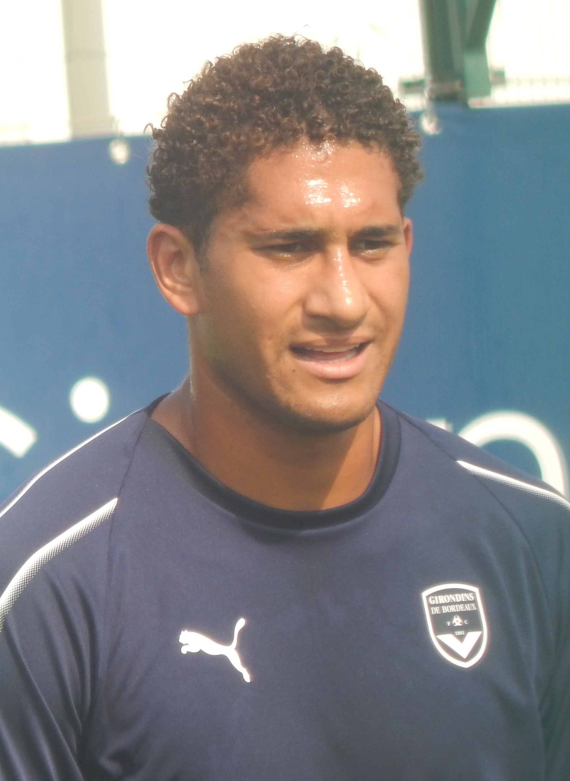 Pablo à l'entraînement avec les Girondins de Bordeaux le 19 juillet 2018.